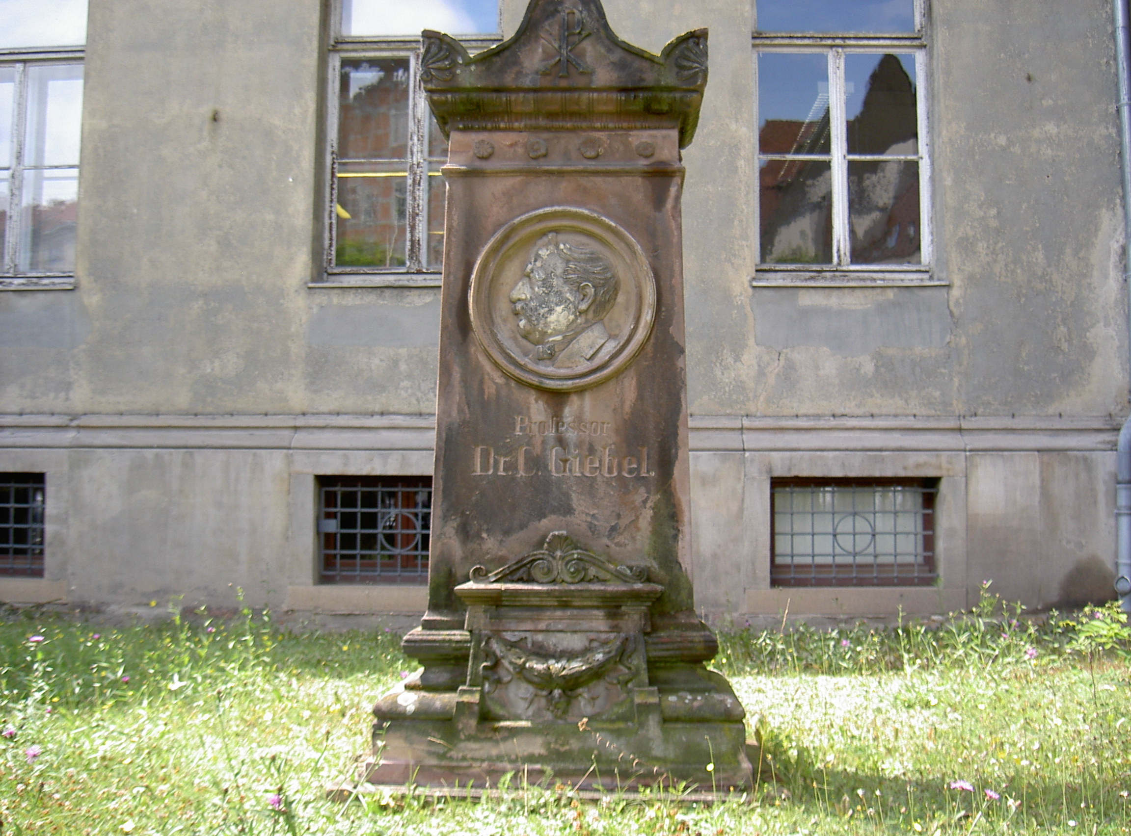 Christian (auch: Christoph) Gottfried Andreas Giebel, Gedenkstein in Halle